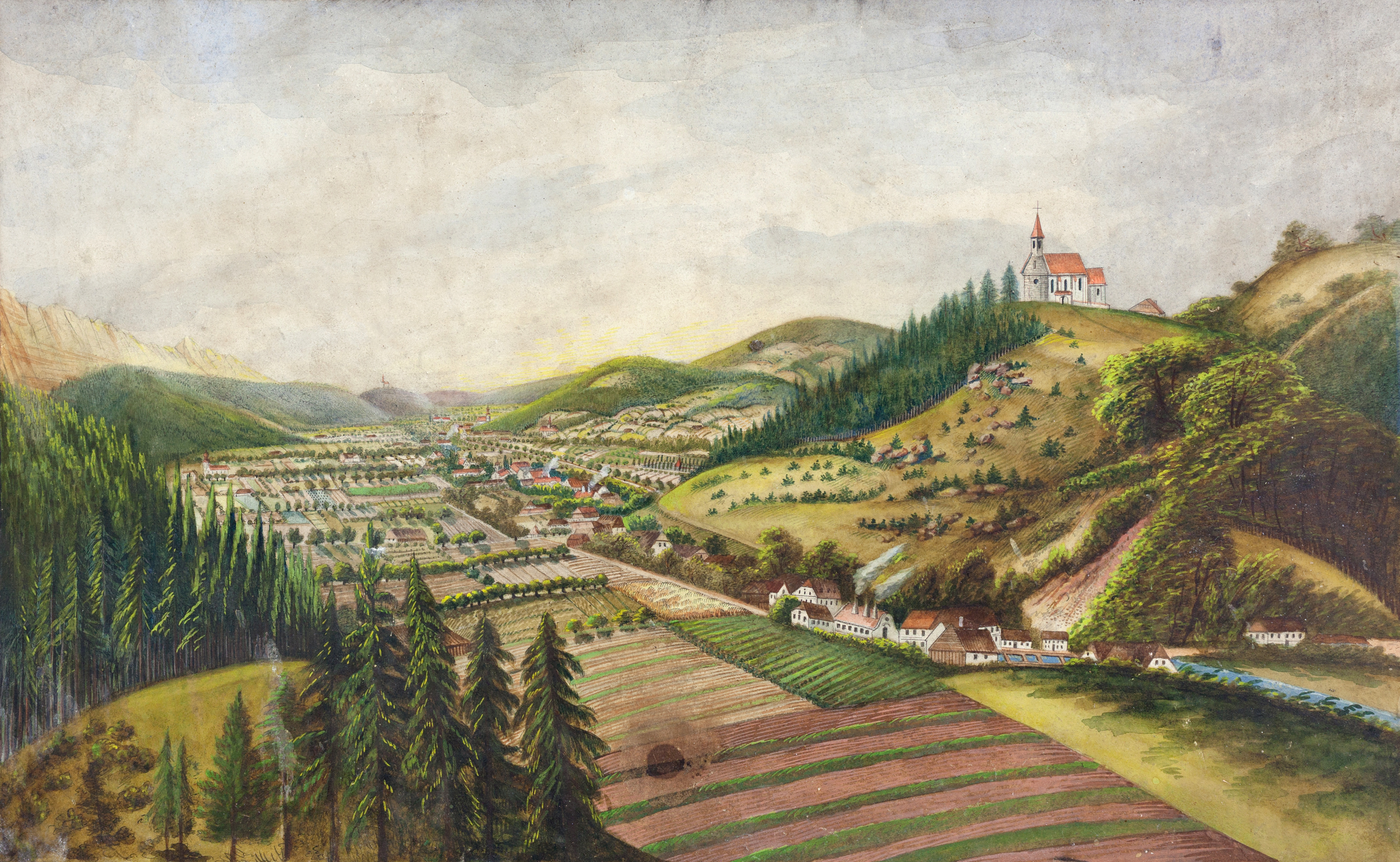 Ansicht von Micheldorf von Süden. Gouache auf Papier, 69,5 x 47,5 cm In der rechten Bildhälfte der Georgiberg, in Bildmitte die Sensenschmiede am Stein; im Hintergrund erkennbar der Gradnteich, die Sensenwerke Schützenhub, an der Zinne, am Aigen, Steinhub, am Gries, Dörflern und Blumau; weiters Kirchdorf, Schloss Neupernstein, und der Magdalenaberg